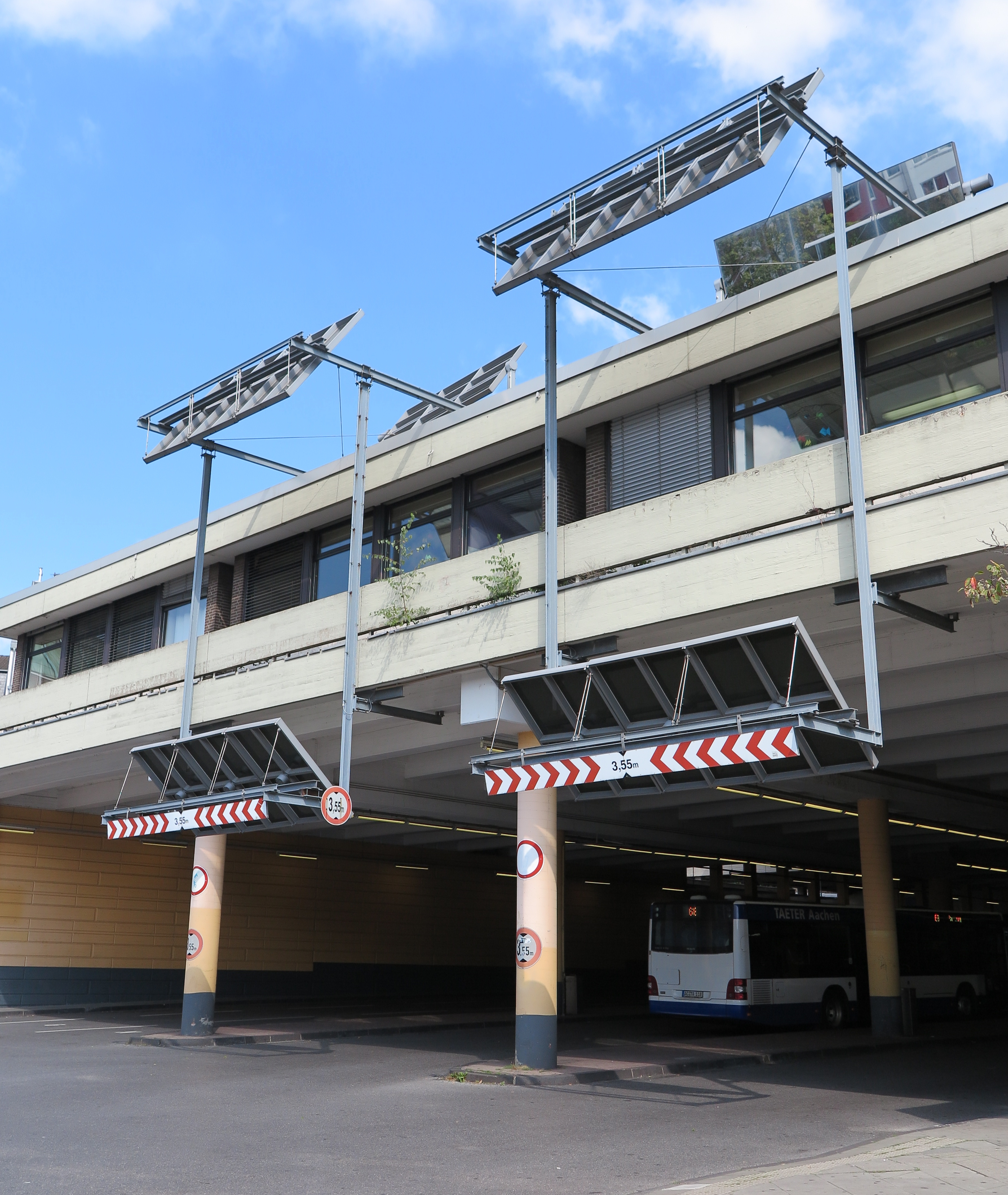 Heliostaten-Anlage am Aachener Bushof. Nachdem die Schildbürger damit gescheitert waren, Licht mit Eimern in ihr fensterloses Rathaus zu tragen, entschied man sich in Aachen für eine modernere Variante um das Innere des düsteren Bushofs zu erhellen.